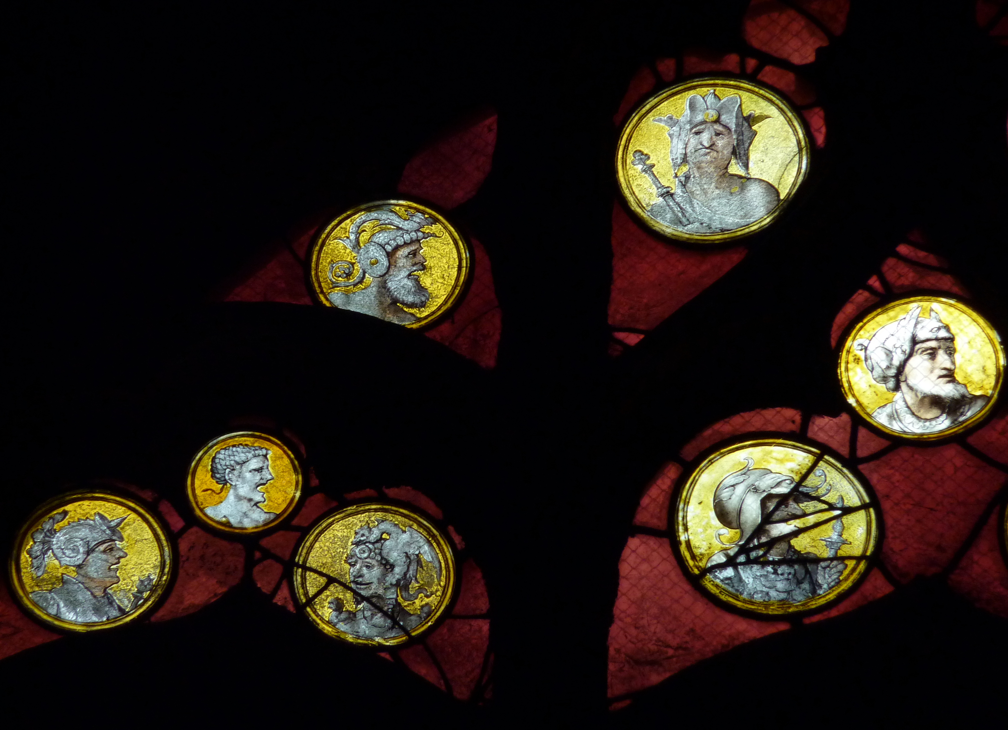 Ausschnitt des Bleiglasfensters Nr. 7 (16. Jahrhundert) in der katholischen Pfarrkirche Saint-Martin (Collégiale Saint-Martin) in Montmorency, mit Signatur E.L.P. (Engrand Leprince), Darstellung: Krieger (siehe: Dominique Foussard, Charles Huet, Mathieu Lours: Églises du Val-d'Oise. Pays de France, Vallée de Montmorency. Société d'Histoire et d'Archéologie de Gonesse et du Pays de France, 2. Auflage, Gonesse 2011, ISBN 9782953155426)